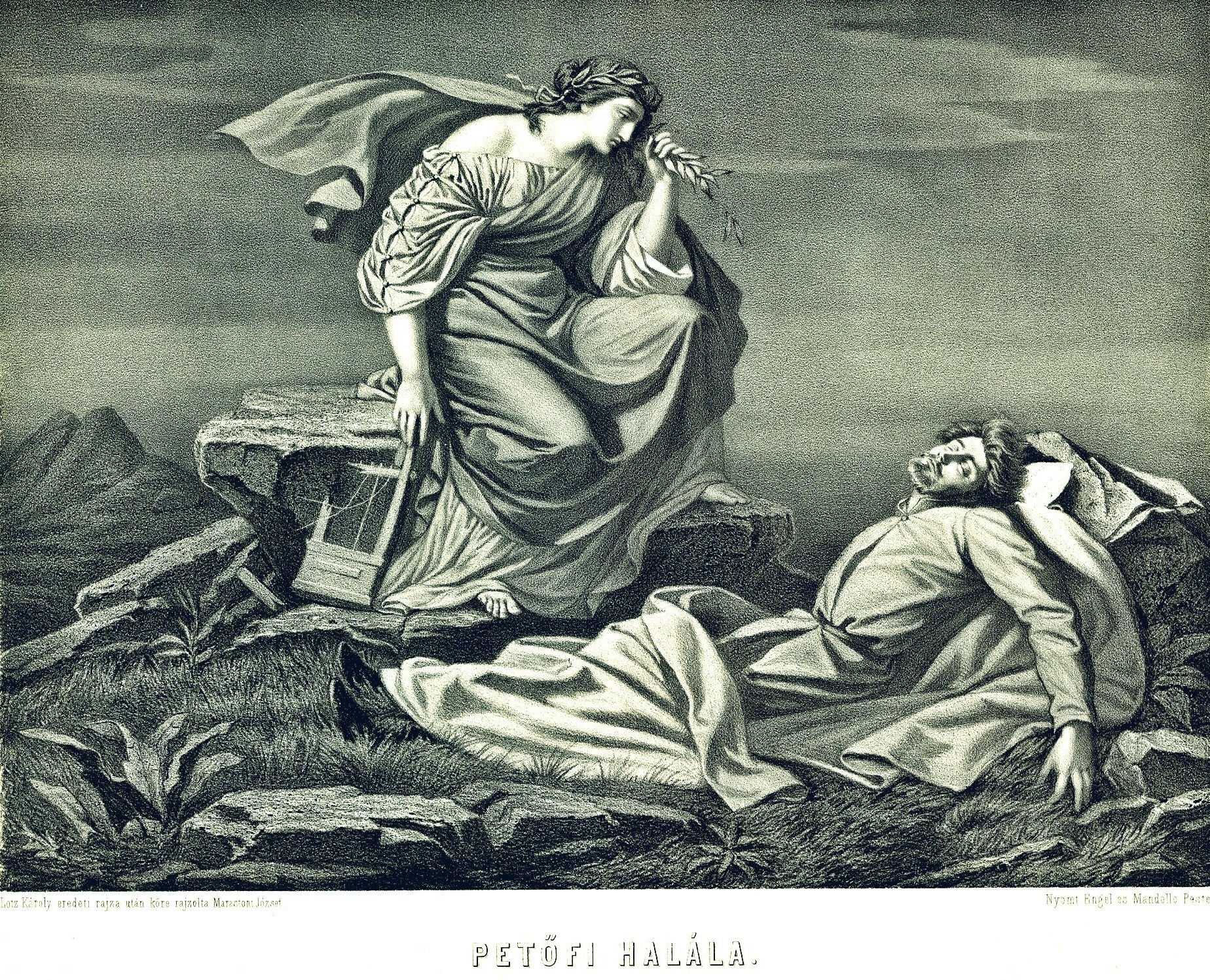 Petőfi halála : Marastoni József litográfiája Lotz Károly rajza után.